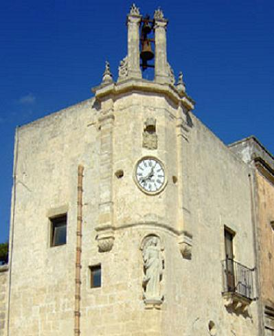 Torre dell'orologio a Spongano